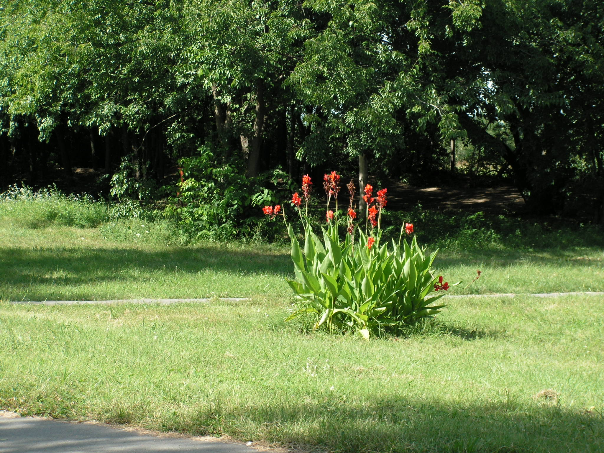 Hungary, Gyömrő, a Teleki kastély